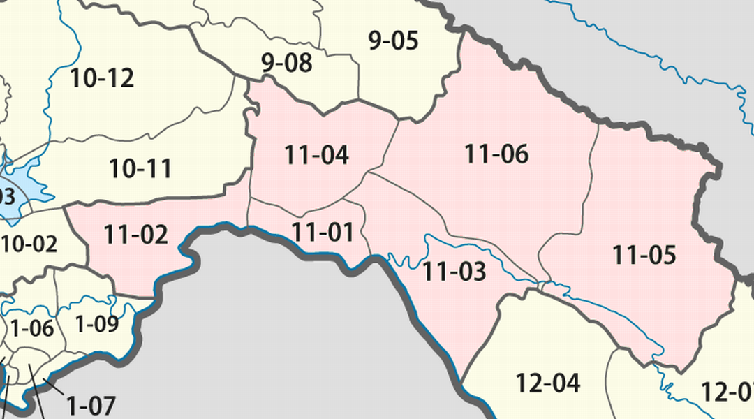 Giấy phép